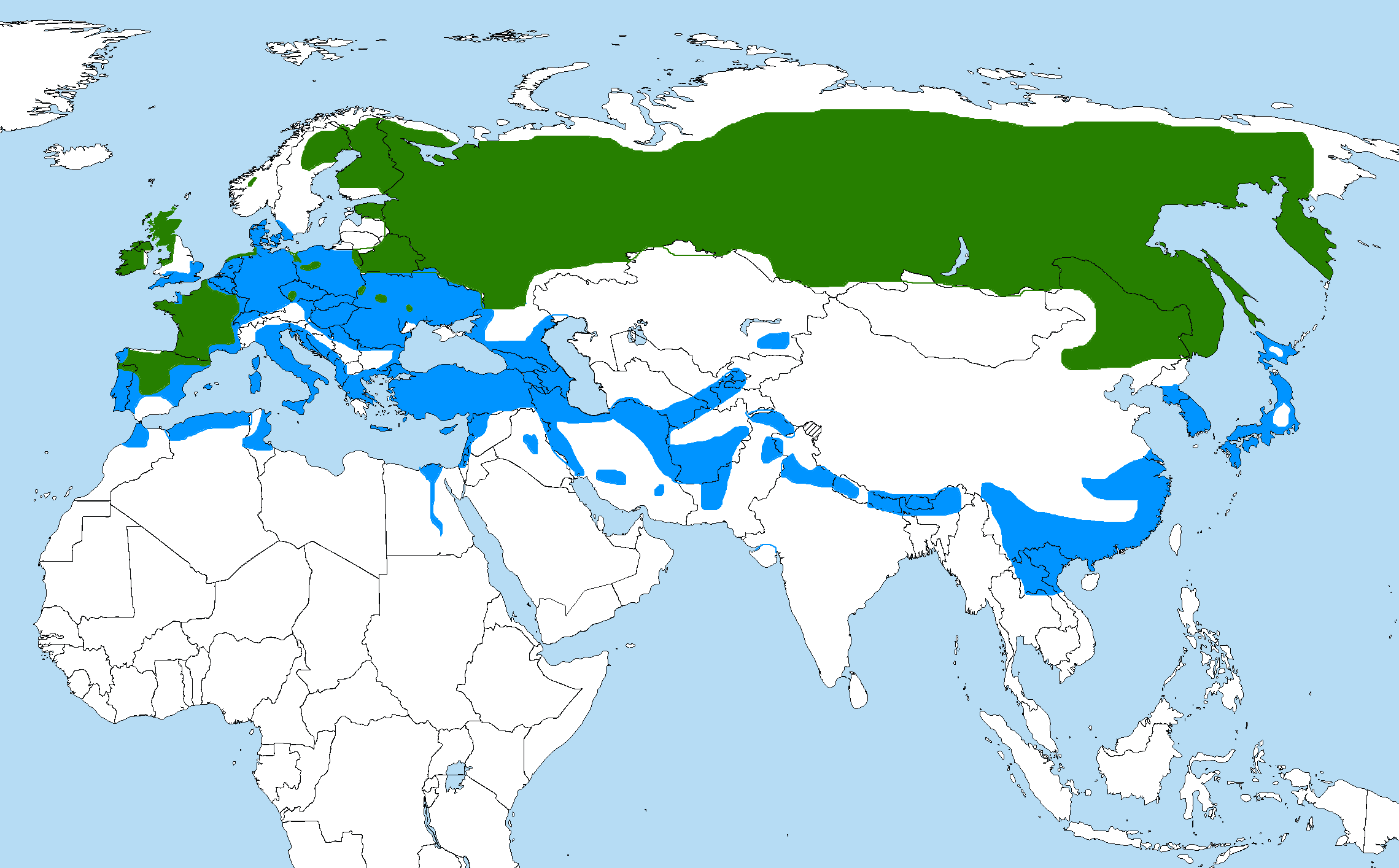 Verbreitung der Kornweihe, grün = Brutareal, blau = Winterquartier. Basierend auf J. Ferguson-Lees, D. A. Christie: Raptors of the World. Christopher Helm, London 2001, ISBN 0-7136-8026-1: S. 481; Brutareal in Europa nach T. Mebs & D. Schmidt: Die Greifvögel Europas, Nordafrikas und Vorderasiens. Franckh-Kosmos, Stuttgart 2006, ISBN 3-440-09585-1: S. 261 Kartengrundlage: A large blank worldmap